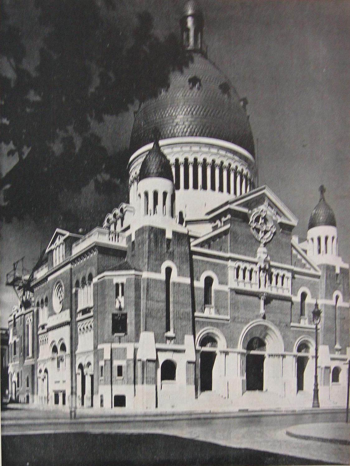 Vista del Santuario Nacional de Santa Rosa de Lima, en la esquina de la Avenida Belgrano y la calle Pasco del barrio de Balvanera, en Buenos Aires, Argentina. Obra de Alejandro Chistophersen.